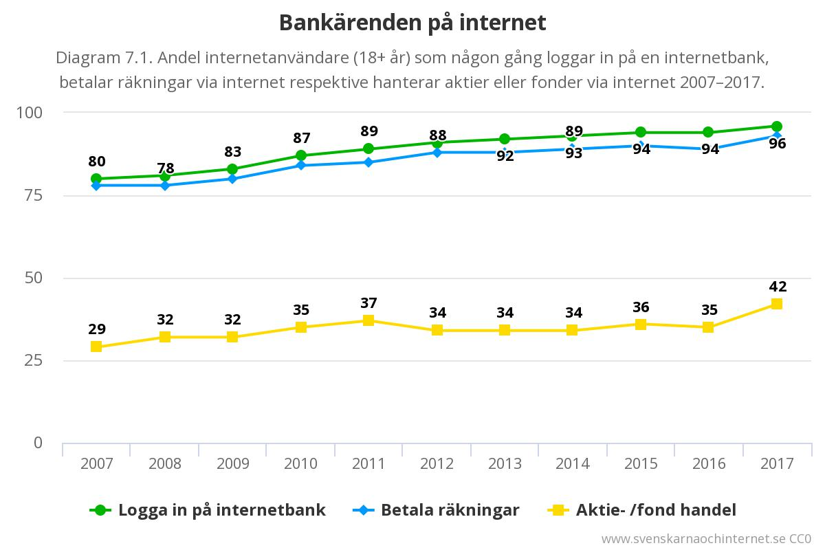 Andel svenska internetanvändare (+18 år) som någon gång loggar in på en internetbank, betalar räkningar via internet respektive hanterar aktier eller fonder via internet 2007–2017. Siffror från undersökningen "Svenskarna och internet 2017".